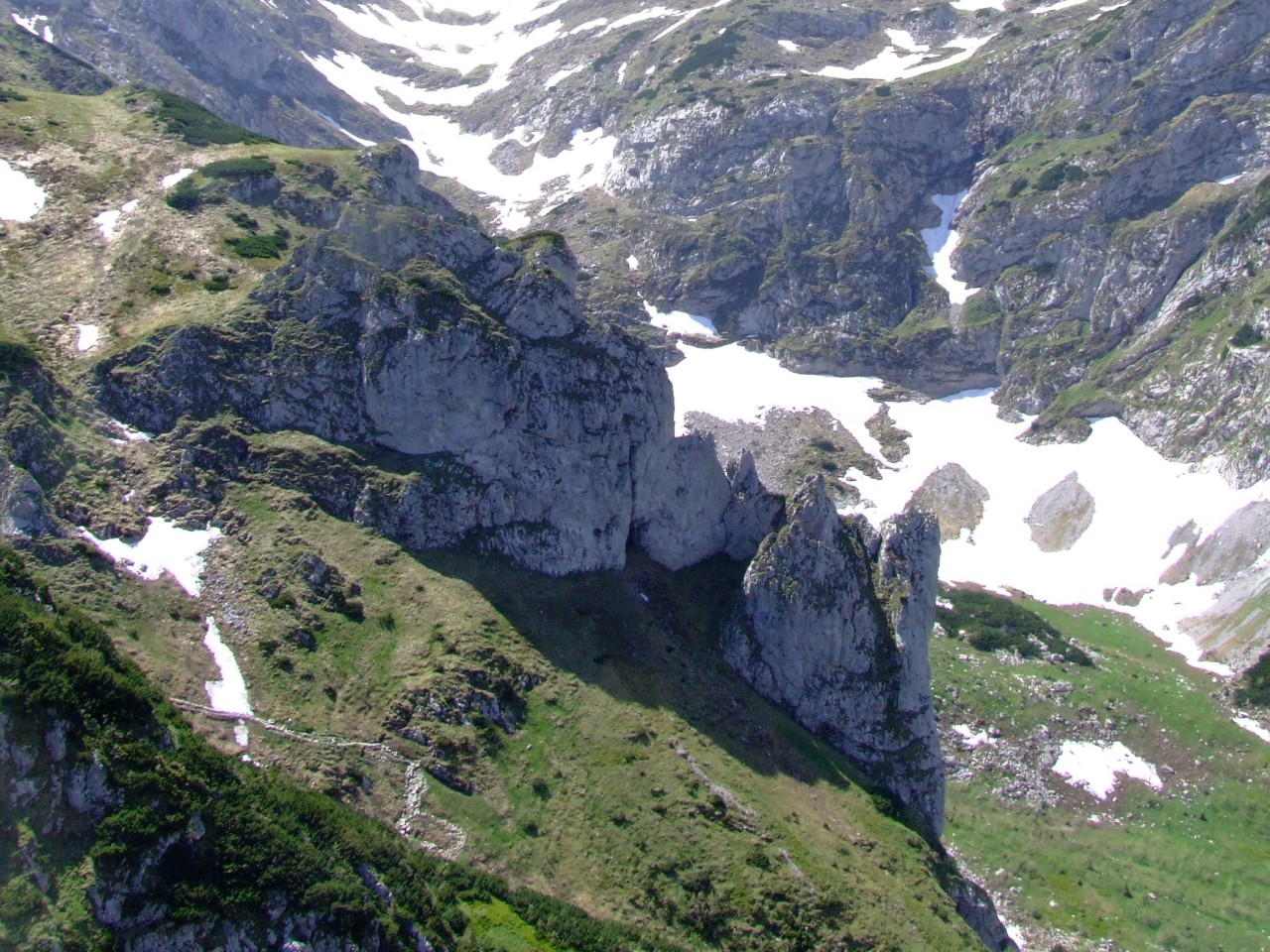 Mnichowe Turnie. Widok ze stoków Giewontu